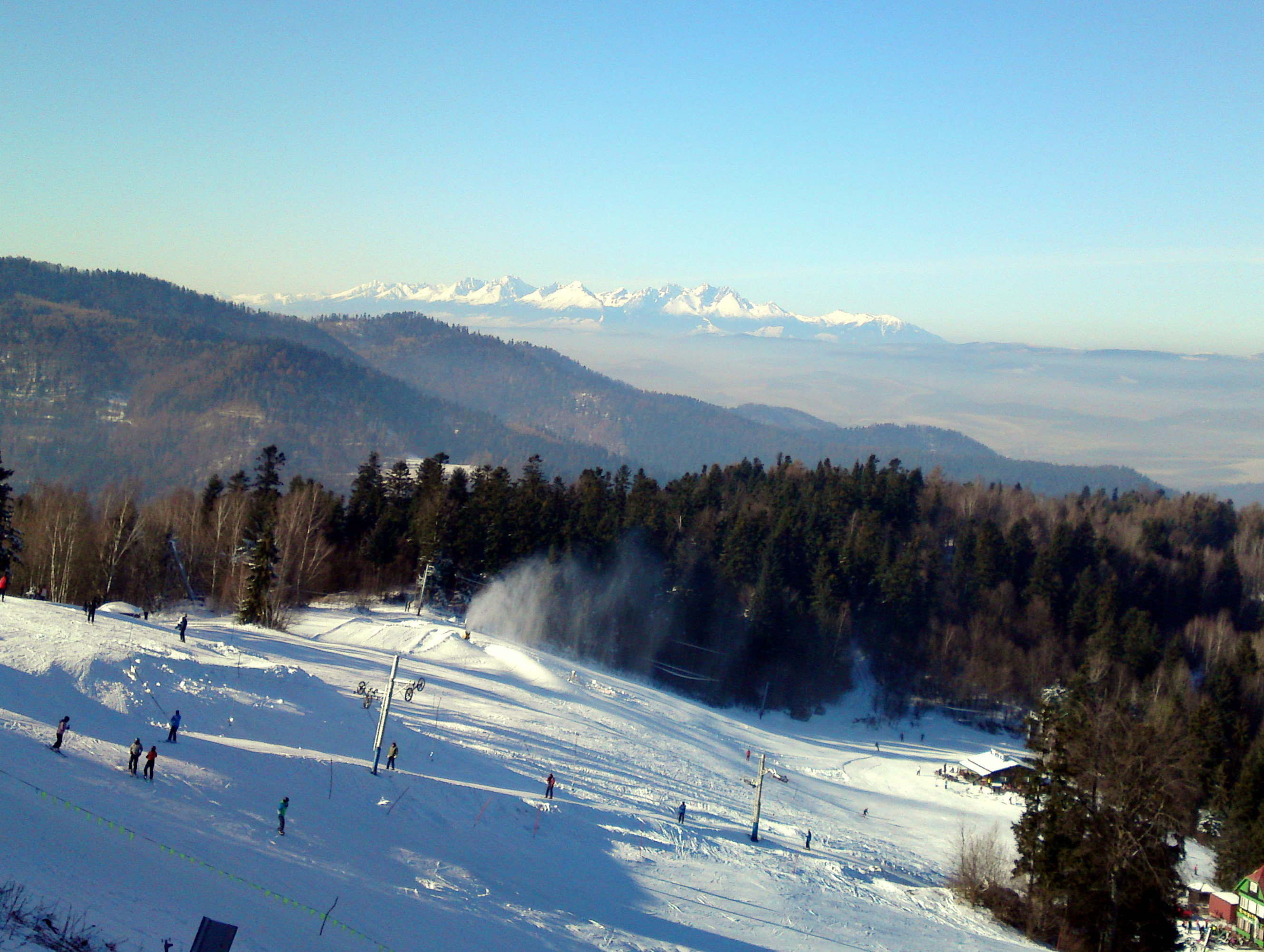 Plejsy, lyžiarske stredisko na východnom Slovensku. V pozadí Vysoké Tatry.